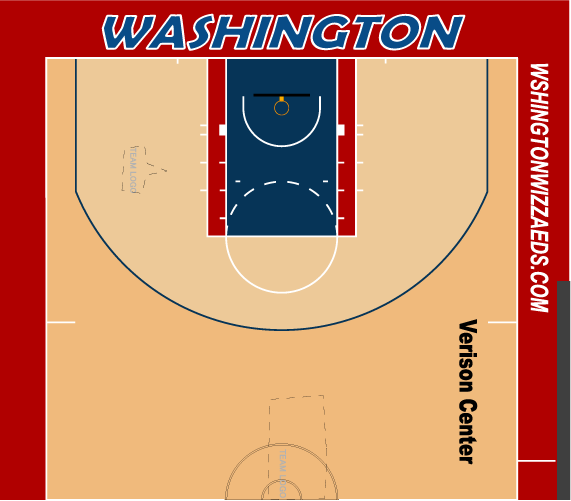 ウィザーズホームコート配色